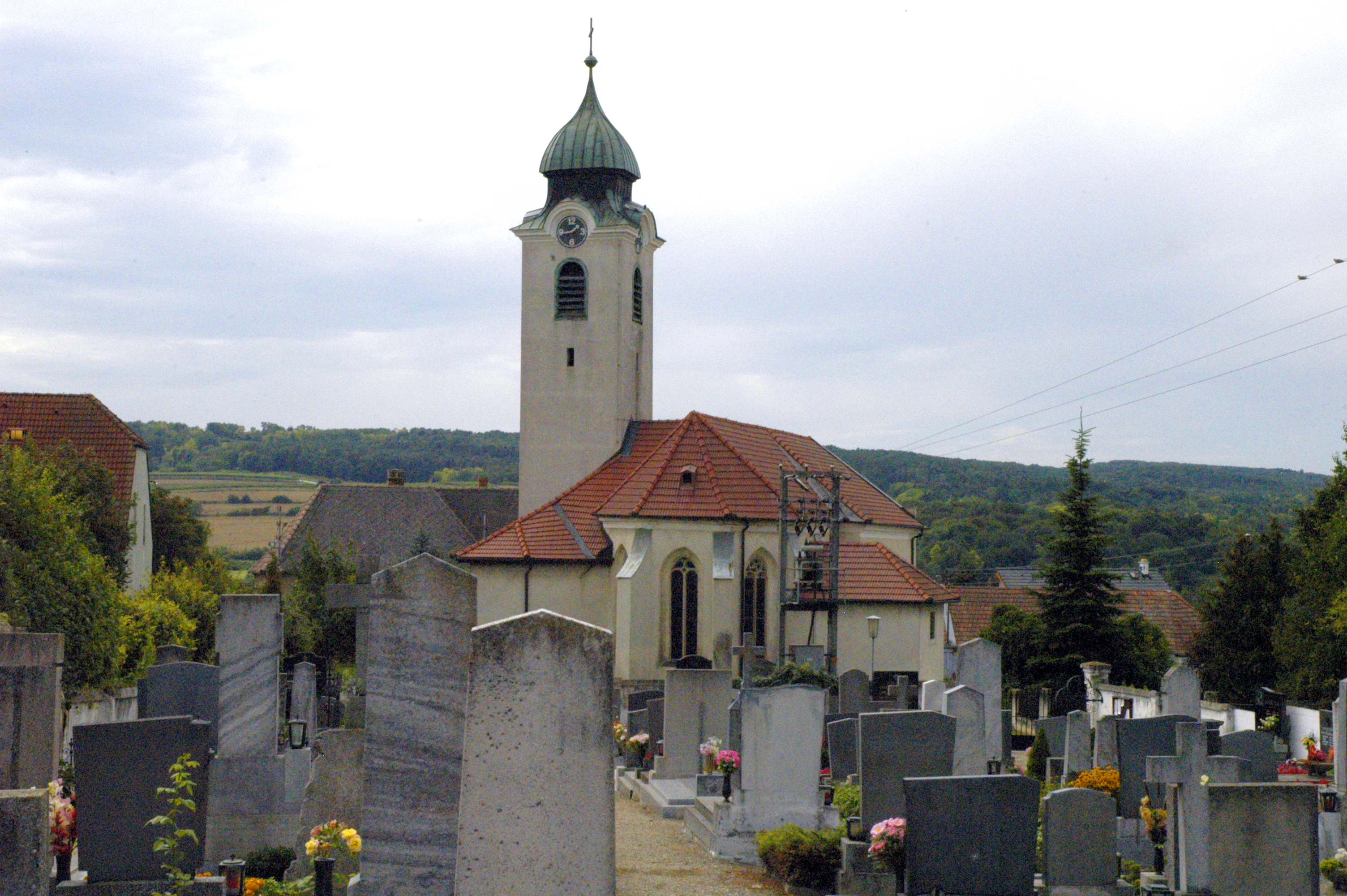 Pfarrkirche heiliger Thomas in Großwetzdorf, Gemeinde Heldenberg